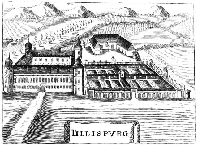 Schloss Tillysburg, Volkendorf